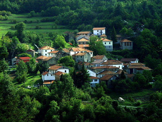 Casalbusone di Mongiardino Ligure in val Gordenella (AL).